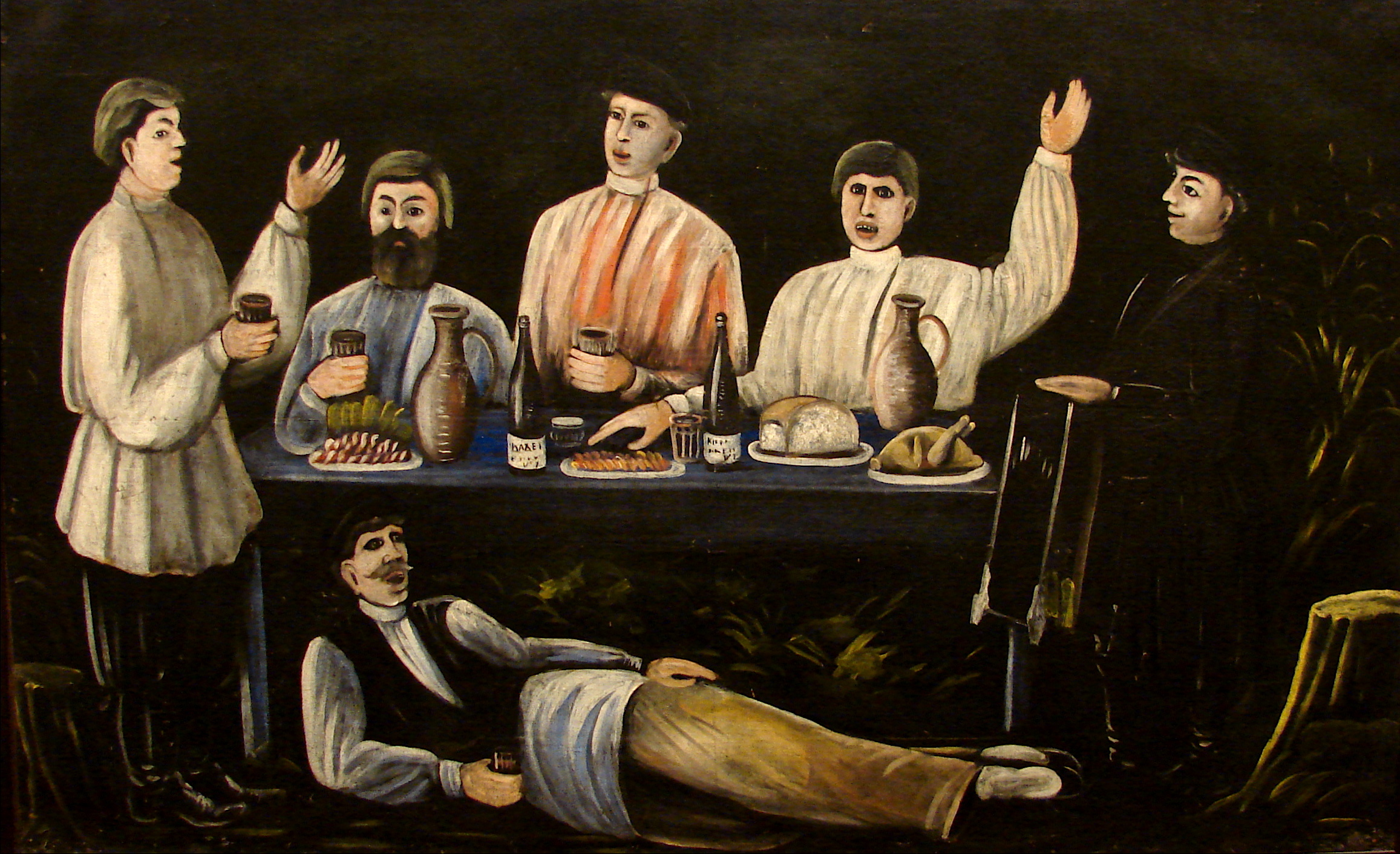 Malakanernes fest af Niko Pirosmani (1862 — 1918), Sighnaghi Museum, Georgien